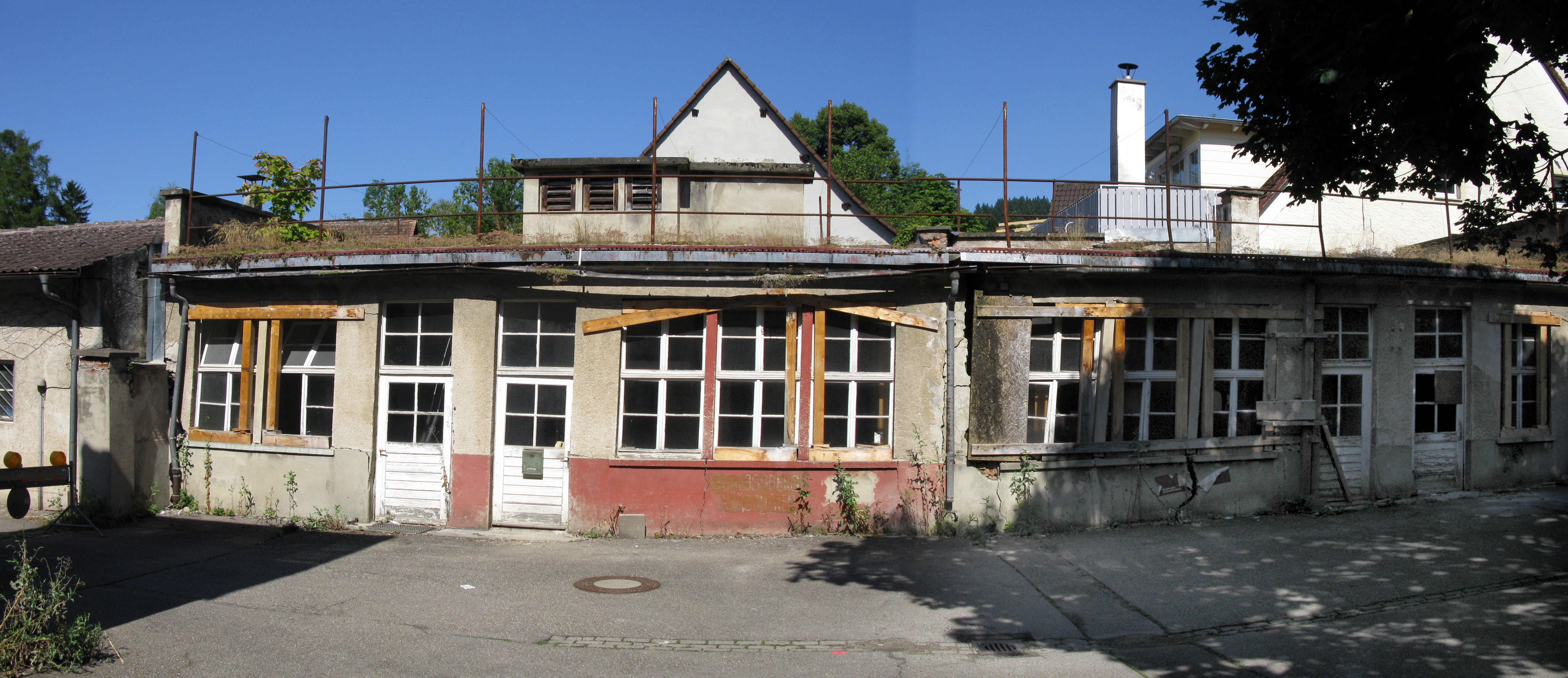 Die alte Schlossbergwäscherei in Staufen wurde als erstes Gebäude, das durch die Geothermiebohrungen geschädigt wurde, am 5. August 2013 abgerissen.